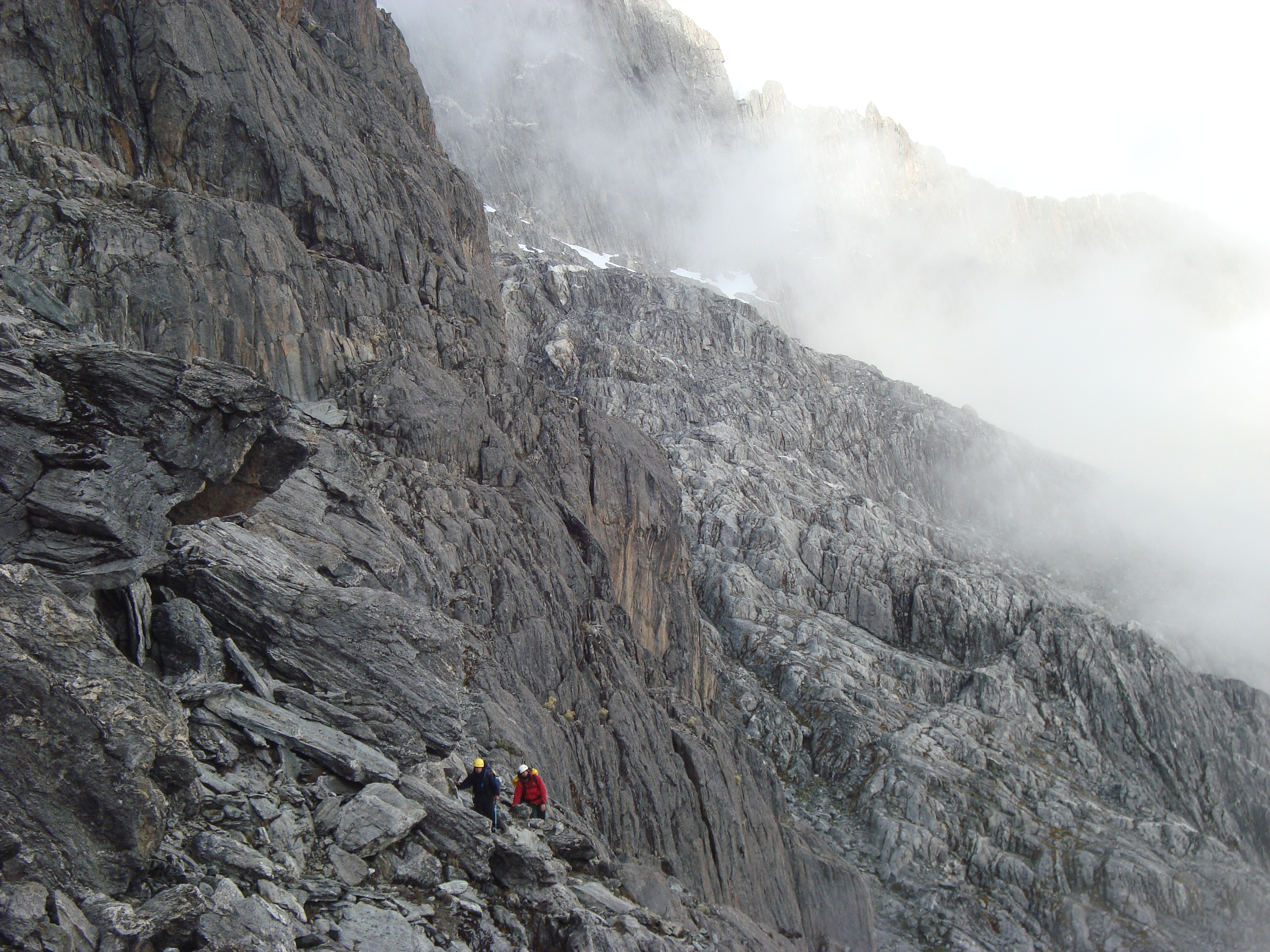 Pico Bolívar, Sierra Nevada, Venezuela